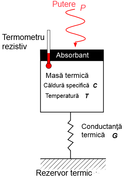 Bolometer